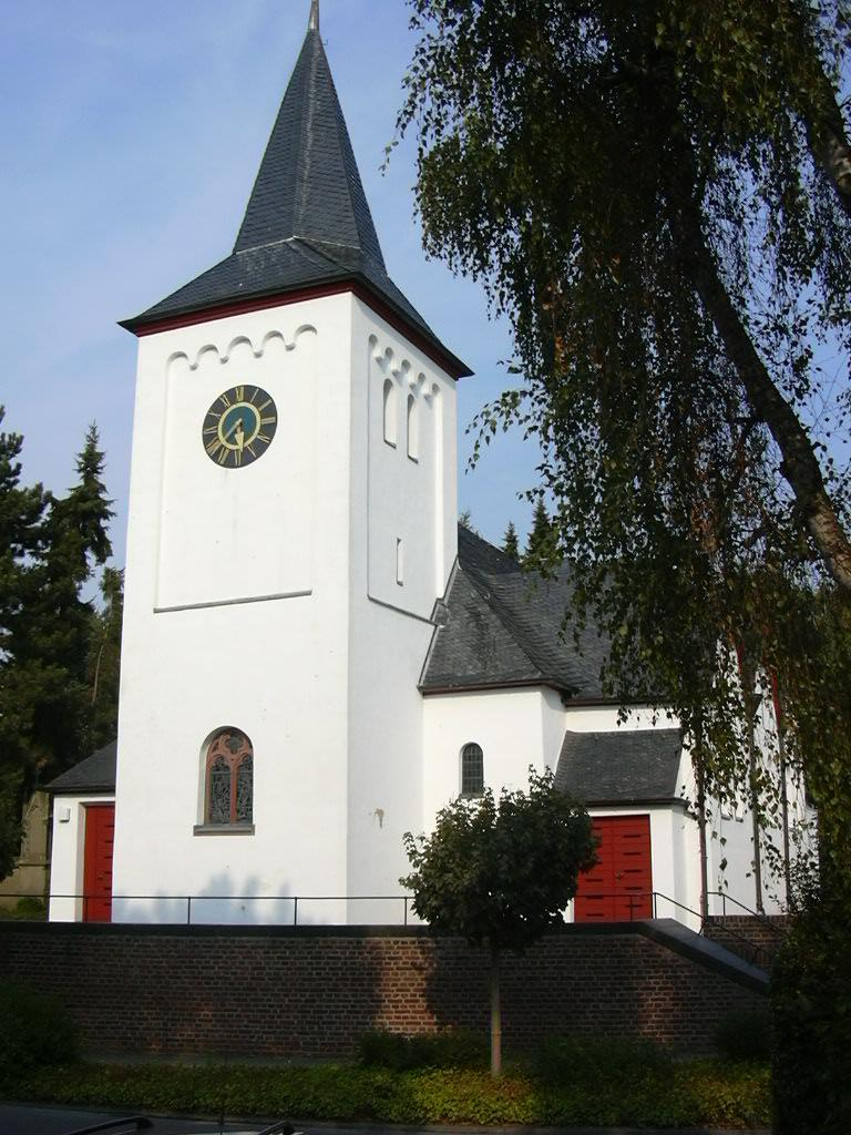 Kirche Pingsheim